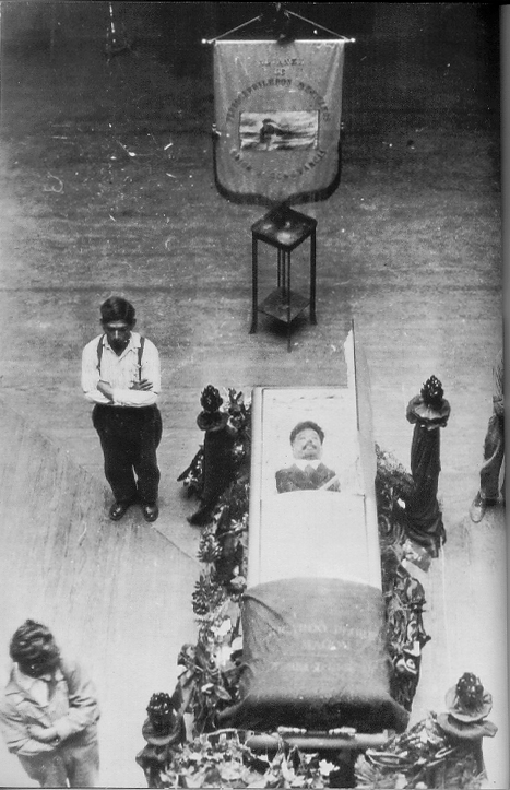 Sepelio de Ricardo Flores Magón periodista y anarquista mexicano muerto en la prisión de Leavenworth, Kansas. El traslado de los restos a México fue auspiciado por el Sindicato de Trabajadores Ferrocarrileros.